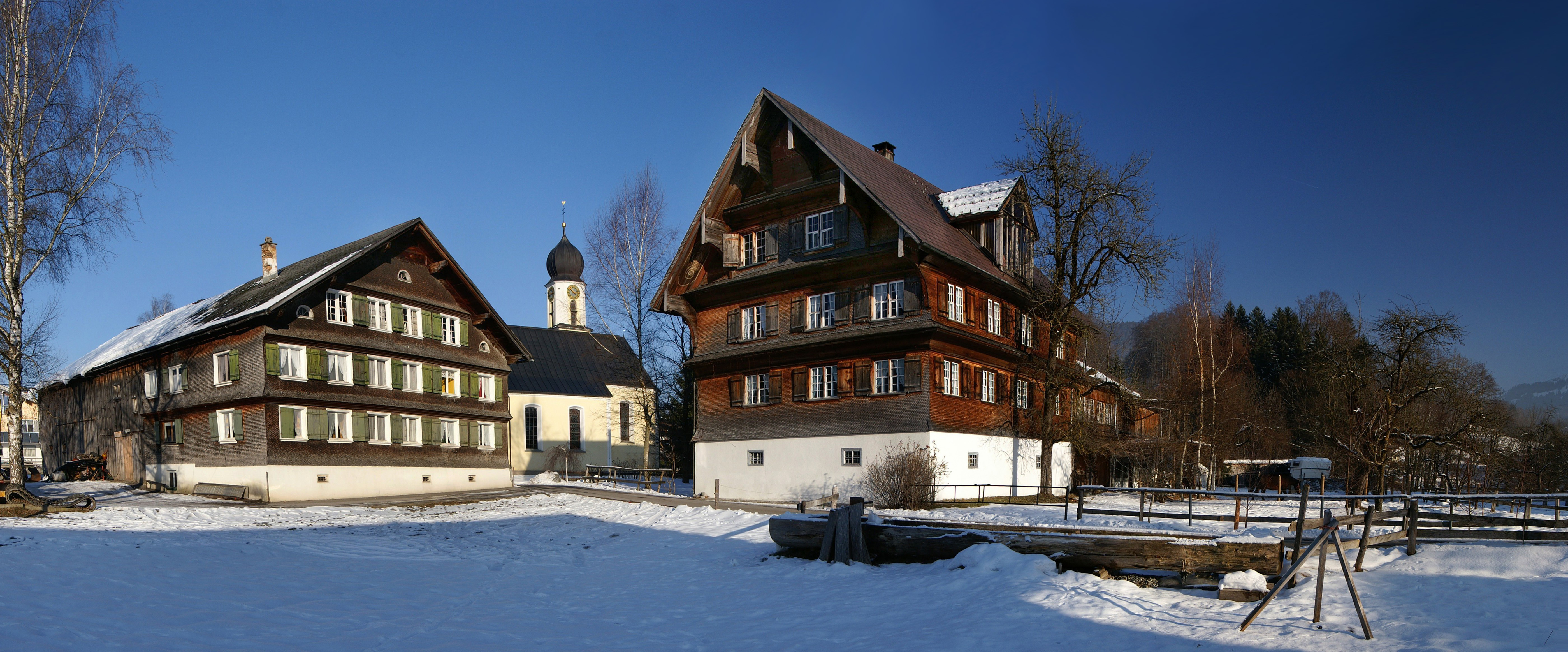 Panorama aus 5 Bilder; im Zentrum von Großdorf, einem Ortsteil von Egg. aus dem DEHIO Vorarlberg 1983: Links Nr.5: Einhof, westlich der Kirche hl.Josef, verschindelter Wohnteil des 18.Jhs., Stirnseite 6achsig, mit Malereien unter dem Schindelpanzer. Rechts Nr.4: Ehemaliges Landammannhaus, erbaut 1770, über hohem Kellersockel errichteter verschindelter Blockbau, 2geschossig mit steilem eingeschossigem Giebel. Satteldach mit Speichergaube. Traufseite zur Strasse 5achsig; Portal in der Mittelachse des Kellergeschosses mit gotisierenden Blendfelder, im Keilstein bezeichnet Joh. Jakob Meusburger 1857, Dachgaube mit Bemalung bezeichnet 1770. An der Stinseite und der südwestlichen Traufseite Klebdächer (unterkehlt). Dachvorstoß ornamental bemalt, geschweifte Pfettenunterzüge.